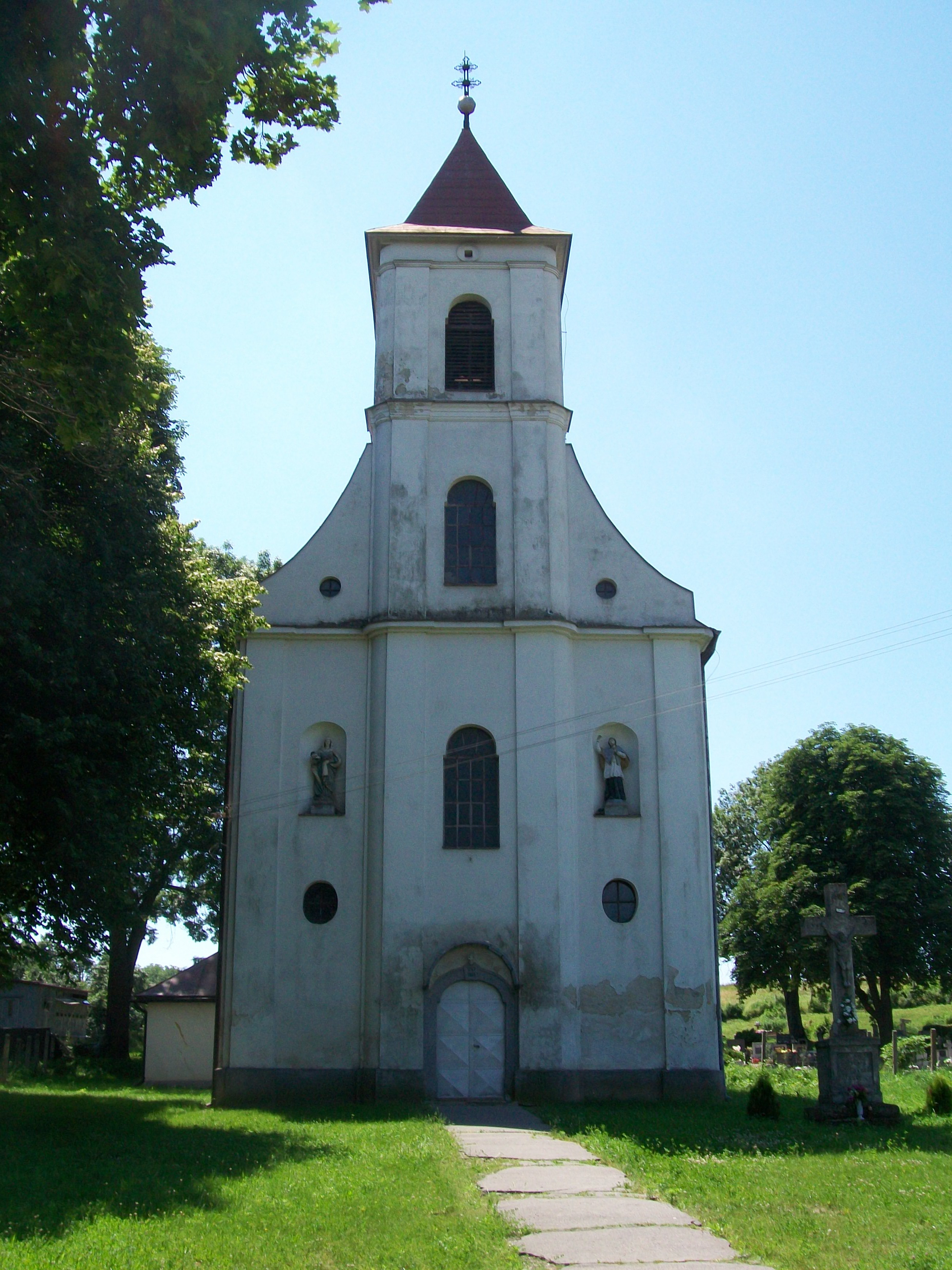 Rímskokatolícky kostol sv. Martina biskupa v Rapovciach.